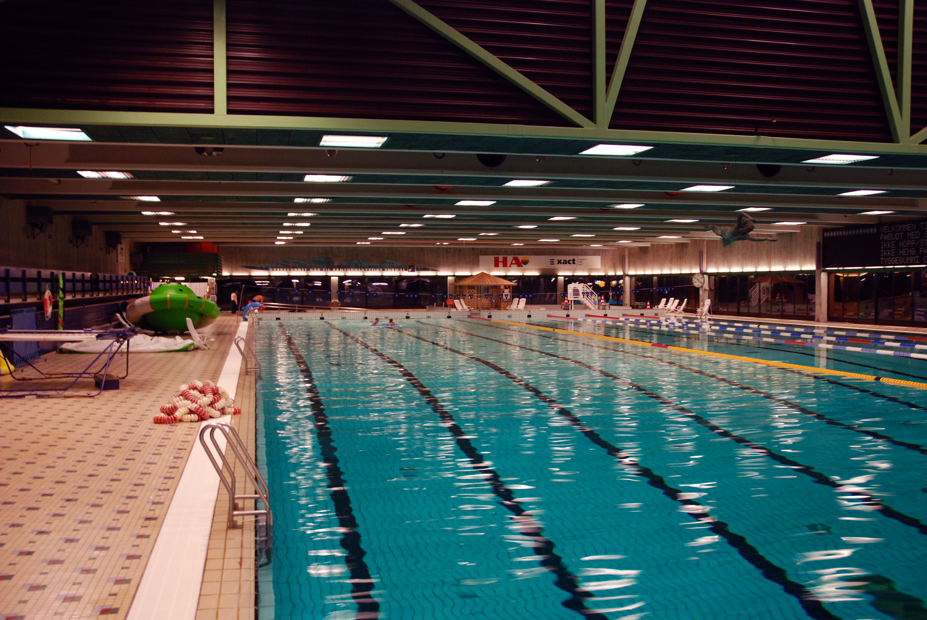 Ankerskogen svømmehall, in Hamar, Hedmark, Norway.